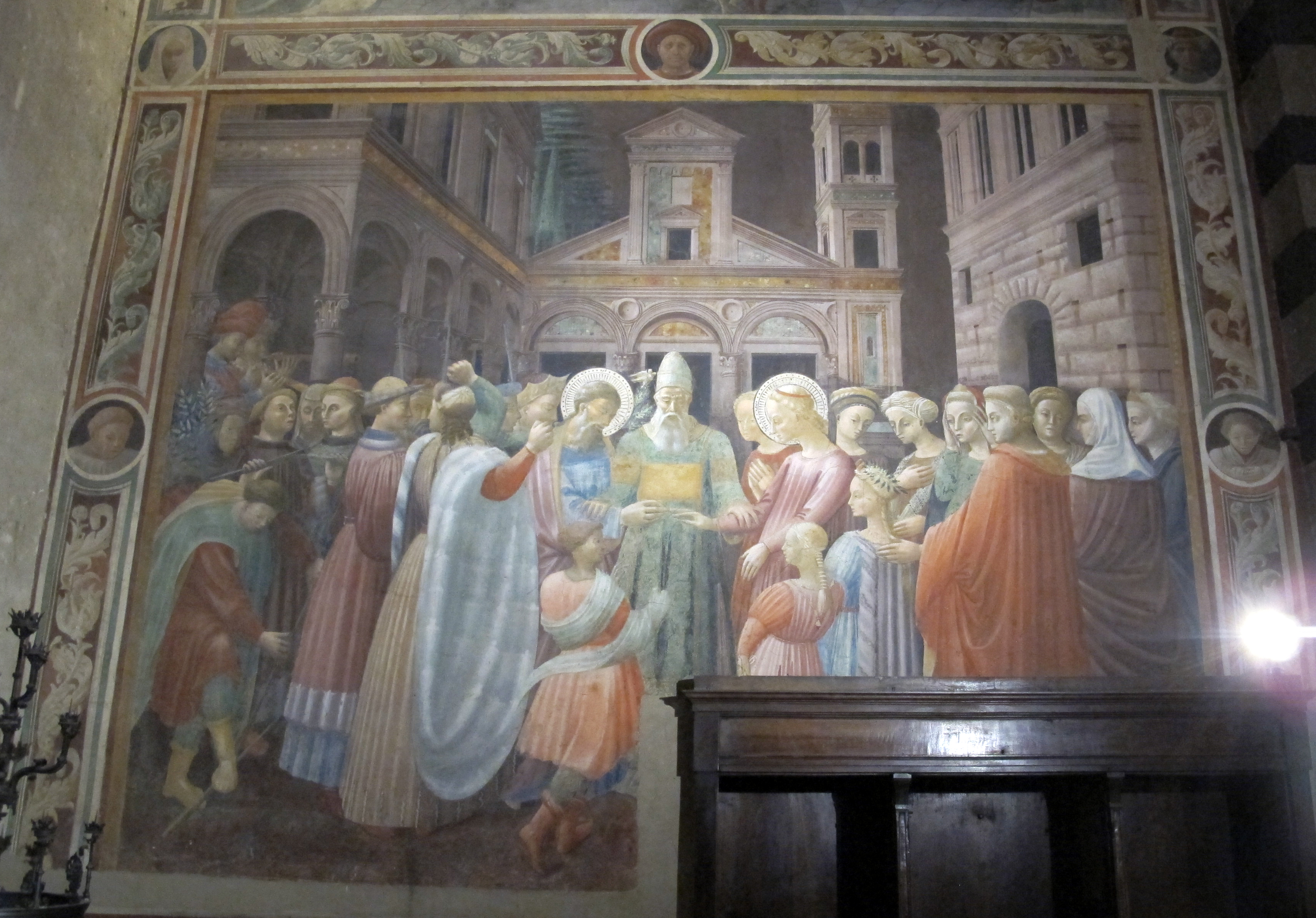 Duomo (Prato) - Cappella dell'Assunta